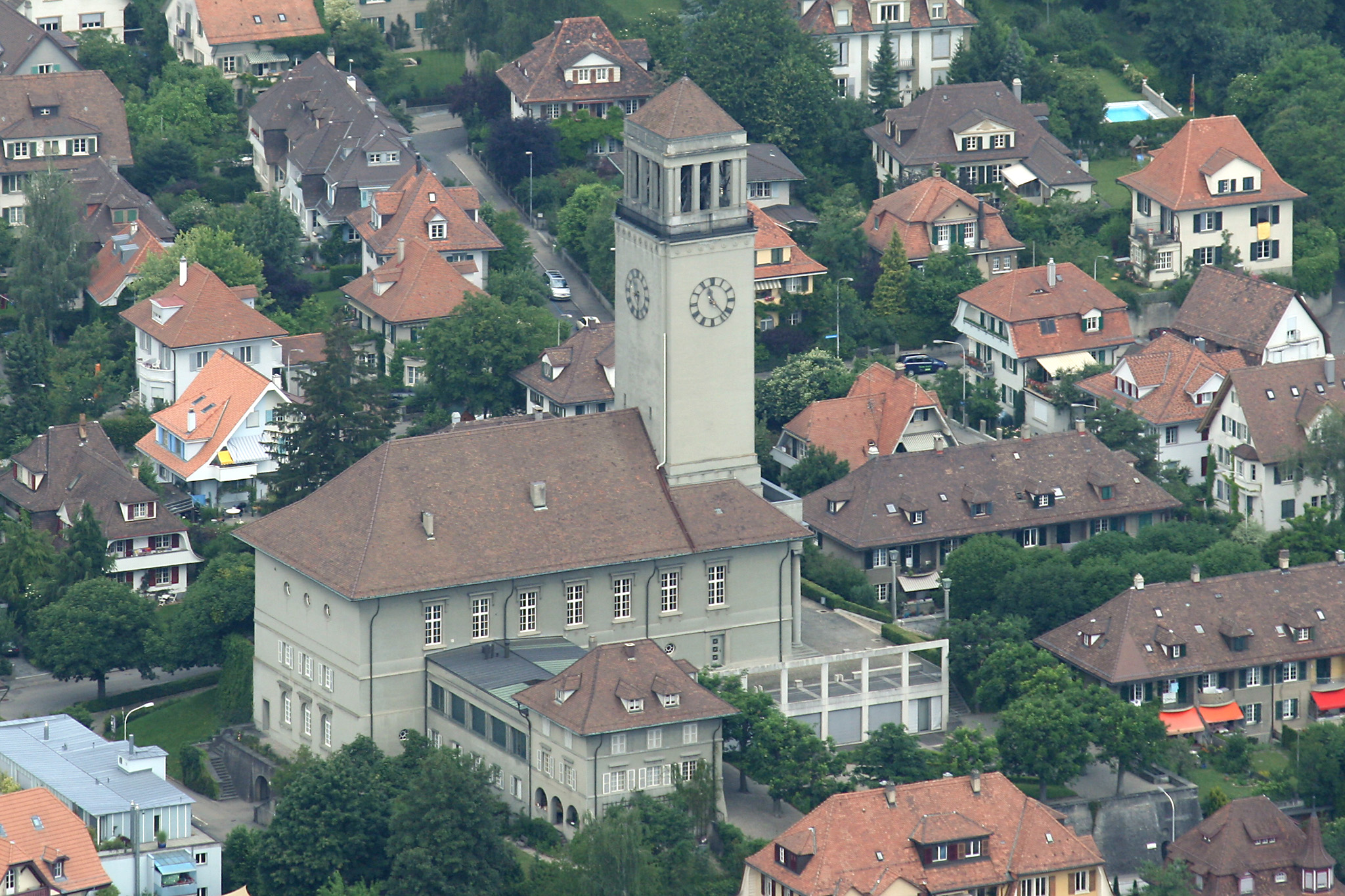 aerial view of Friedenskirche, Berne, Switzerland